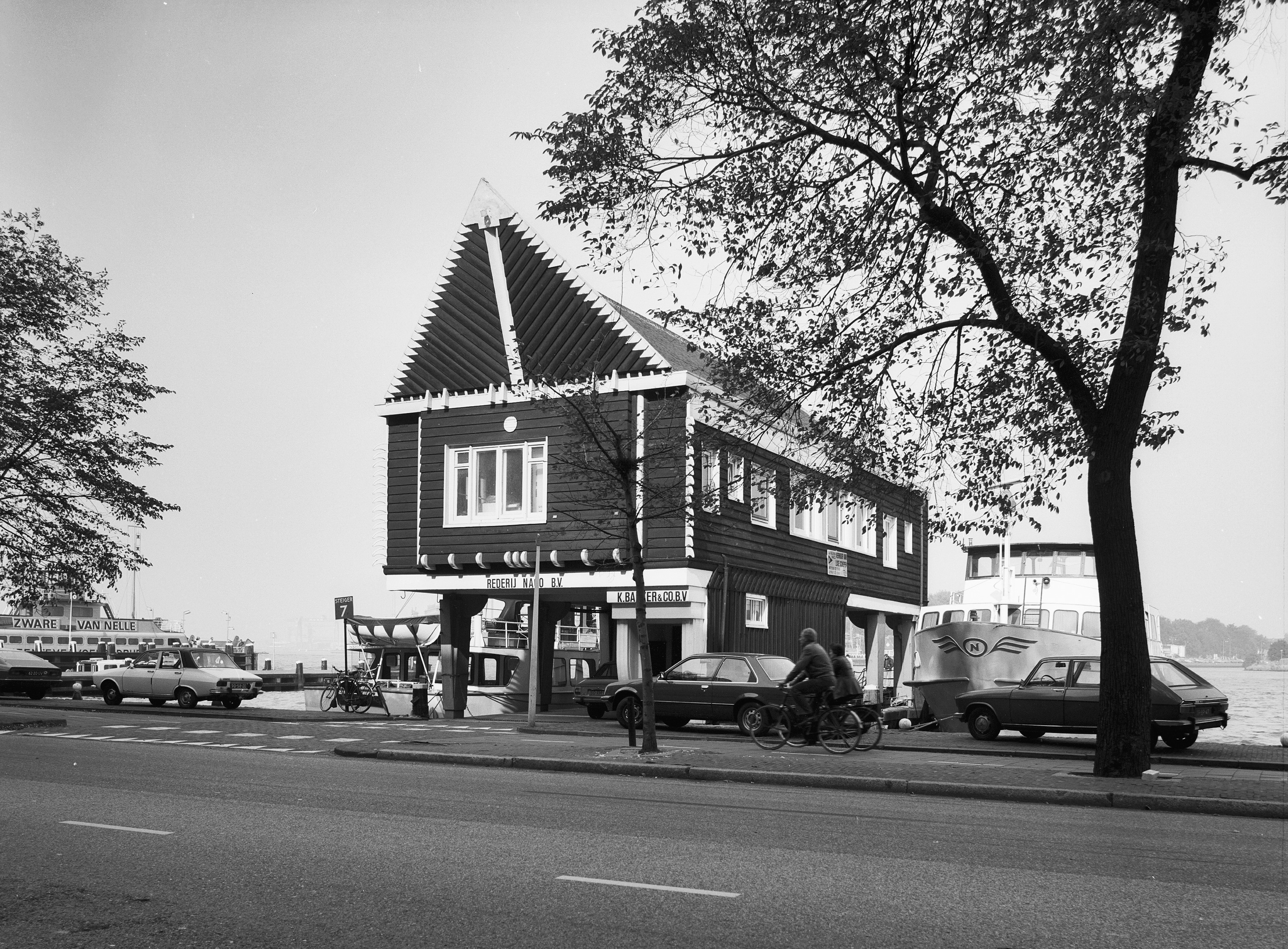 Steiger nr. 7, Scheepskantoor